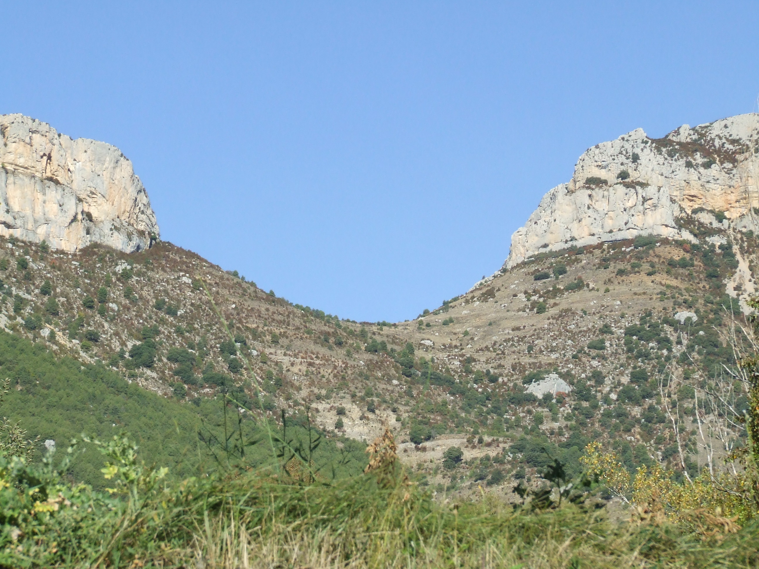 La Collada del Trumfo (Abella de la Conca, Pallars Jussà)